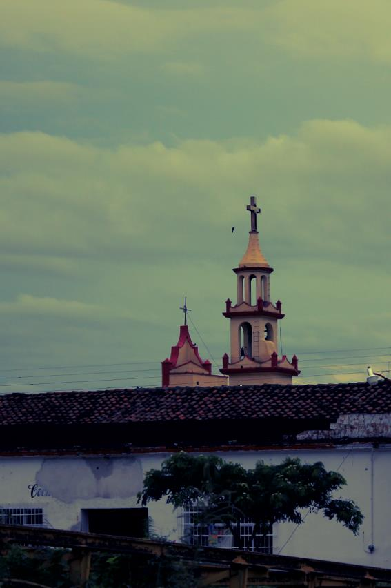 Campanario de la iglesia catolica de Arriaga Chiapas fotografia de Jorge Luis de los Santos Trujillo